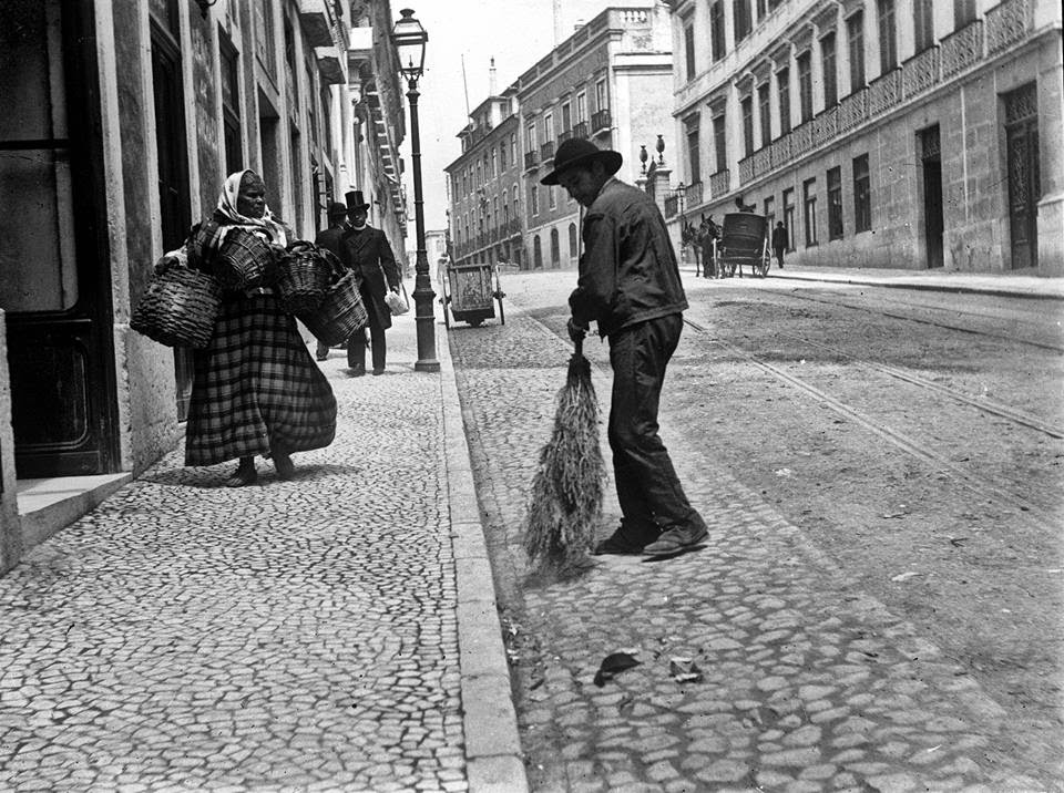 Rua de São José, meados da década de 1900, vendo-se ainda as linhas do ascensor de São Sebastião.